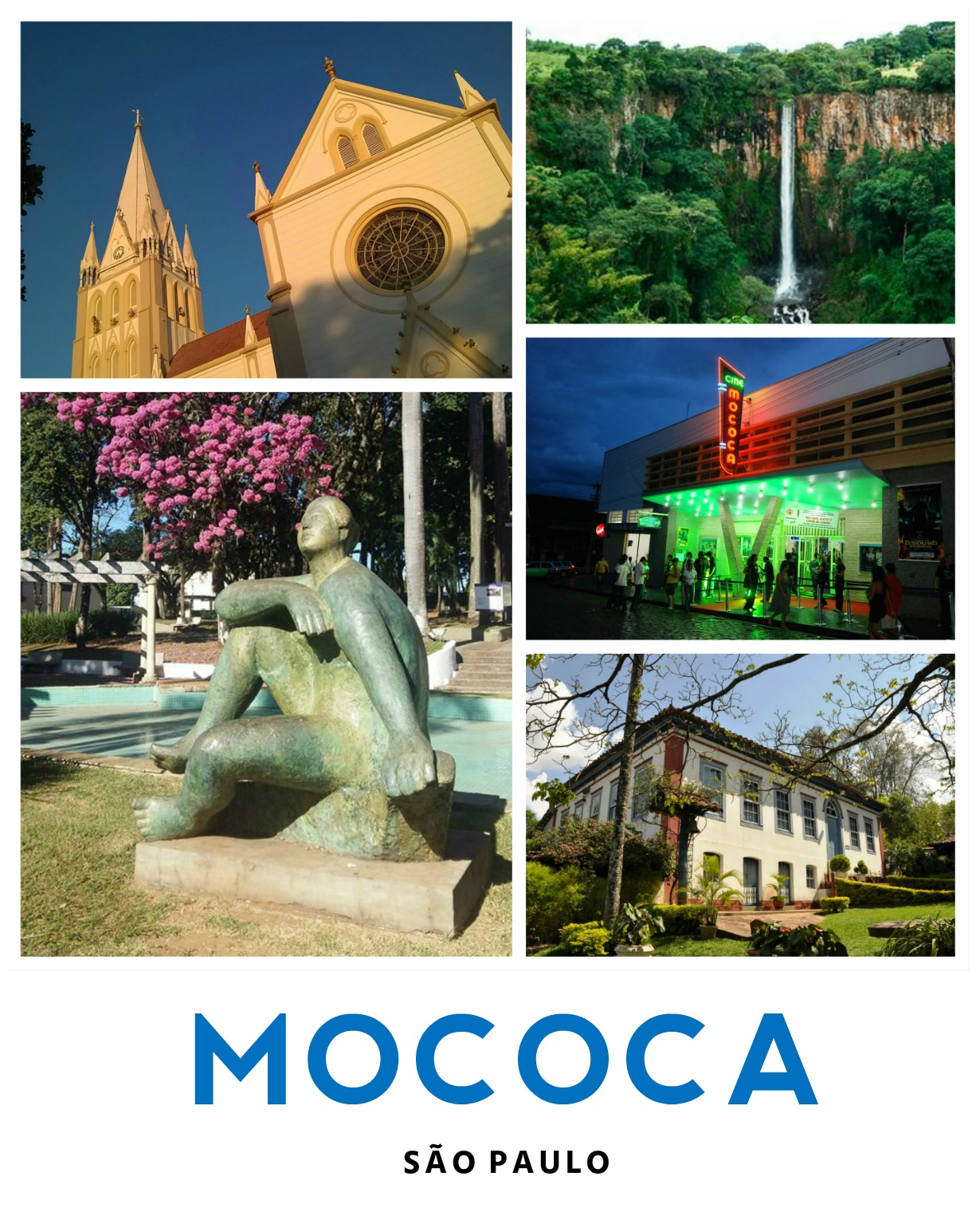 Atrativos turísticos rurais e urbanos de Mococa